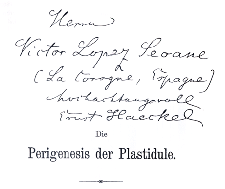 Ernst Haeckel a Víctor López Seoane